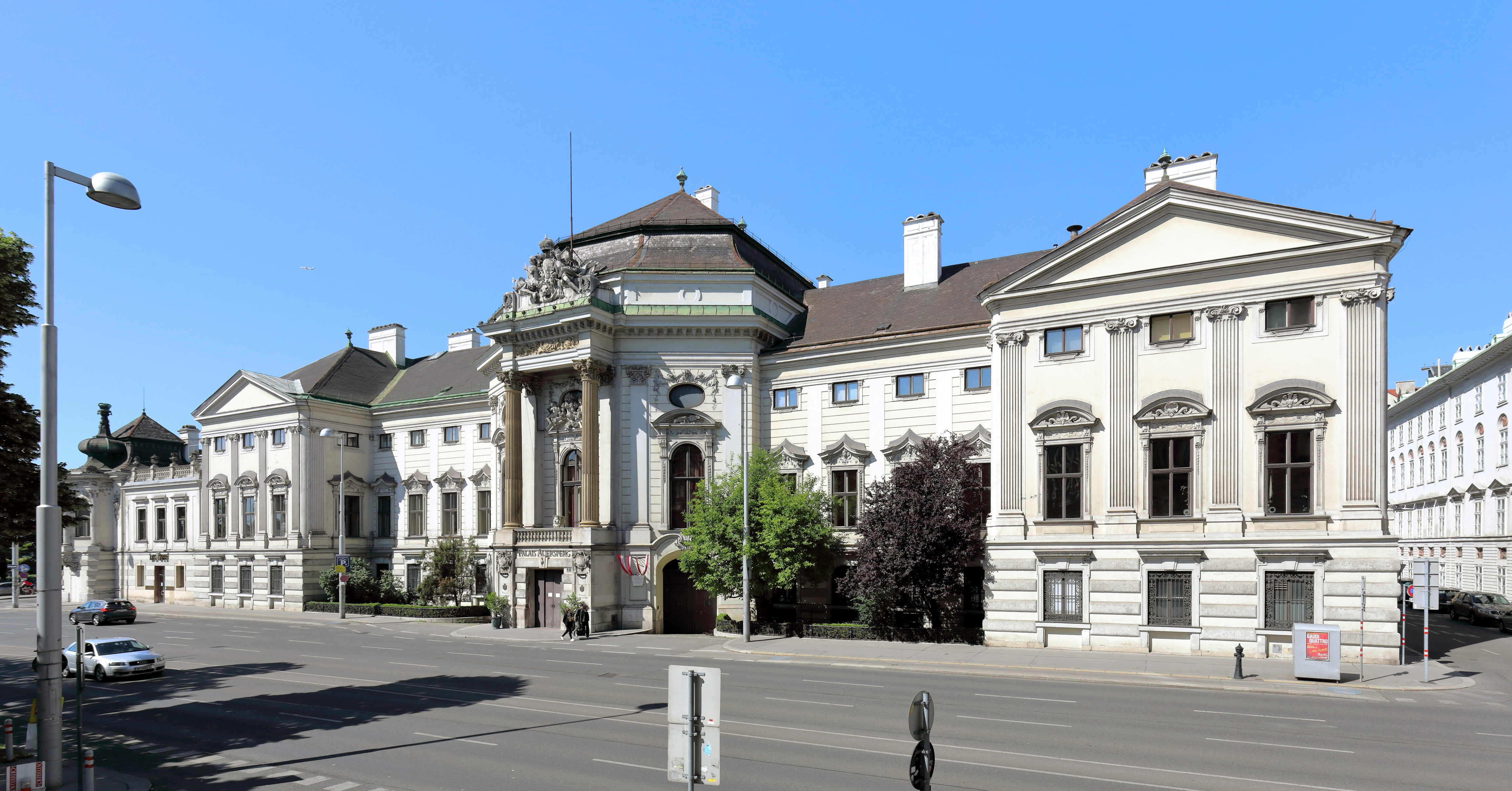 Ostansicht des Palais Auersperg im 8. Wiener Gemeindebezirk Josefstadt.Um 1710 vermutlich nach Entwürfen von Johann Lucas von Hildebrandt als Sommerpalais für Ferdinand Karl Graf Weltz errichtet. Um 1720 Ankauf und Ausbau des Palais durch Hieronymus Marchese Capece di Rofrano. Dabei wurde unter anderem vermutlich von Johann Christian Neupauer der polygonale vorspringende Mittelrisalit angebaut. Um 1780 kam das Palais in den Besitz von Johann Adam Fürst Auersperg und von 1853 bis 1856 erfolgte eine umfassende Restauration.